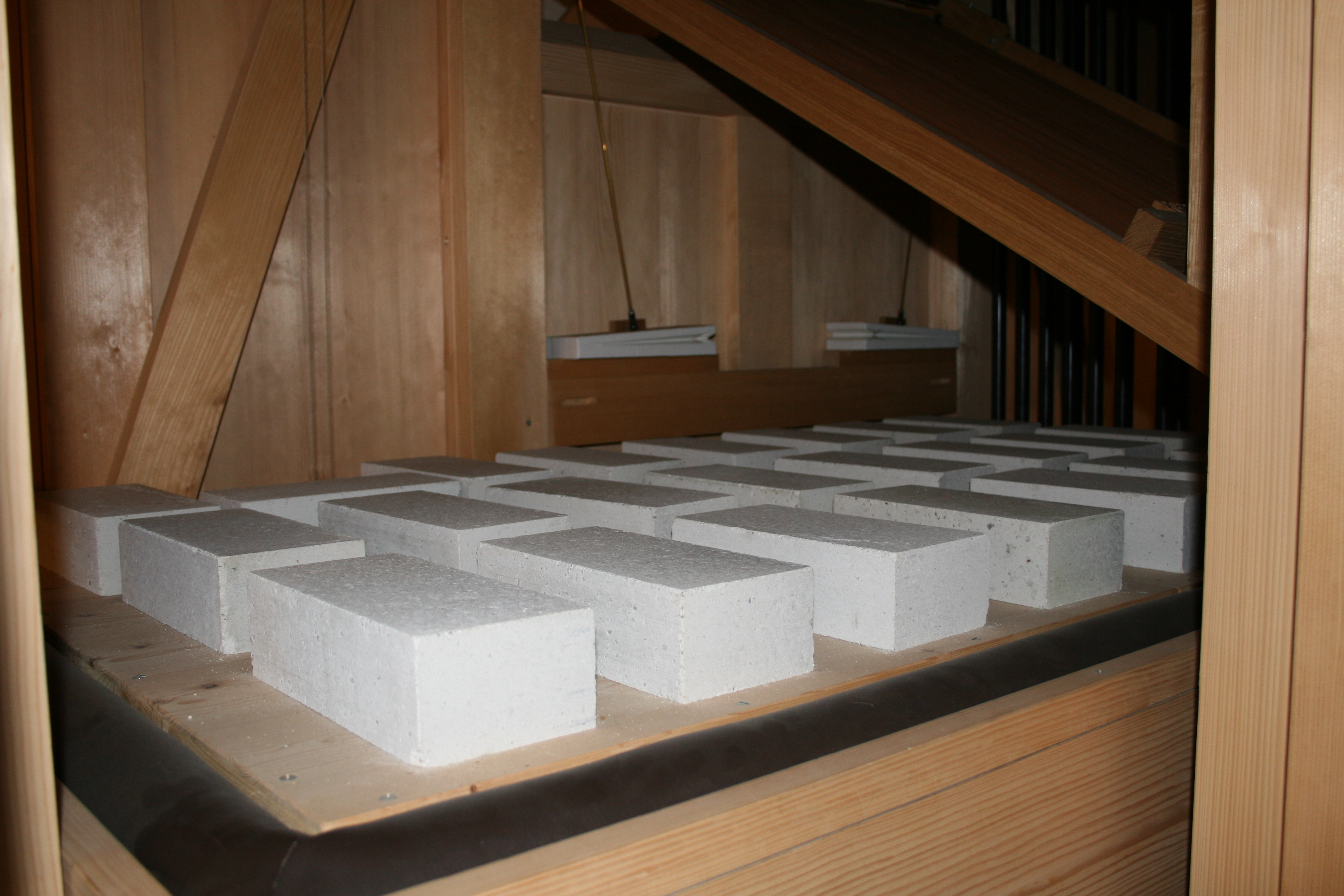 Innenleben der Goll Orgel in St. Martin, Memmingen. Magazinbalg mit Gewichtsteinen. Im Hintergrund rechts zwei von drei vorhandenen Tremulanten.